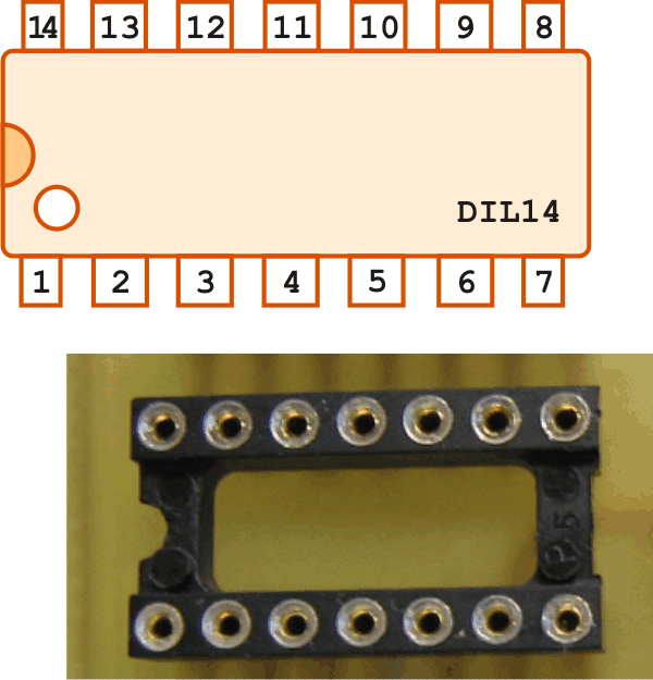 Esquema de encapsulado DIL14 y fotografía de un zócalo.